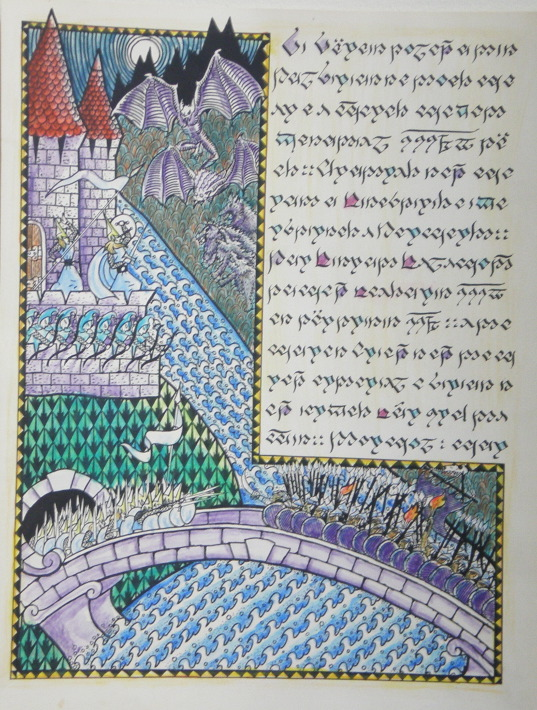 STORMING OF TOL SIRION